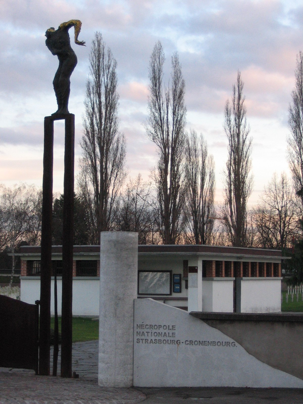 entrée de la nécropole nationale de Strasbourg-Cronenbourg